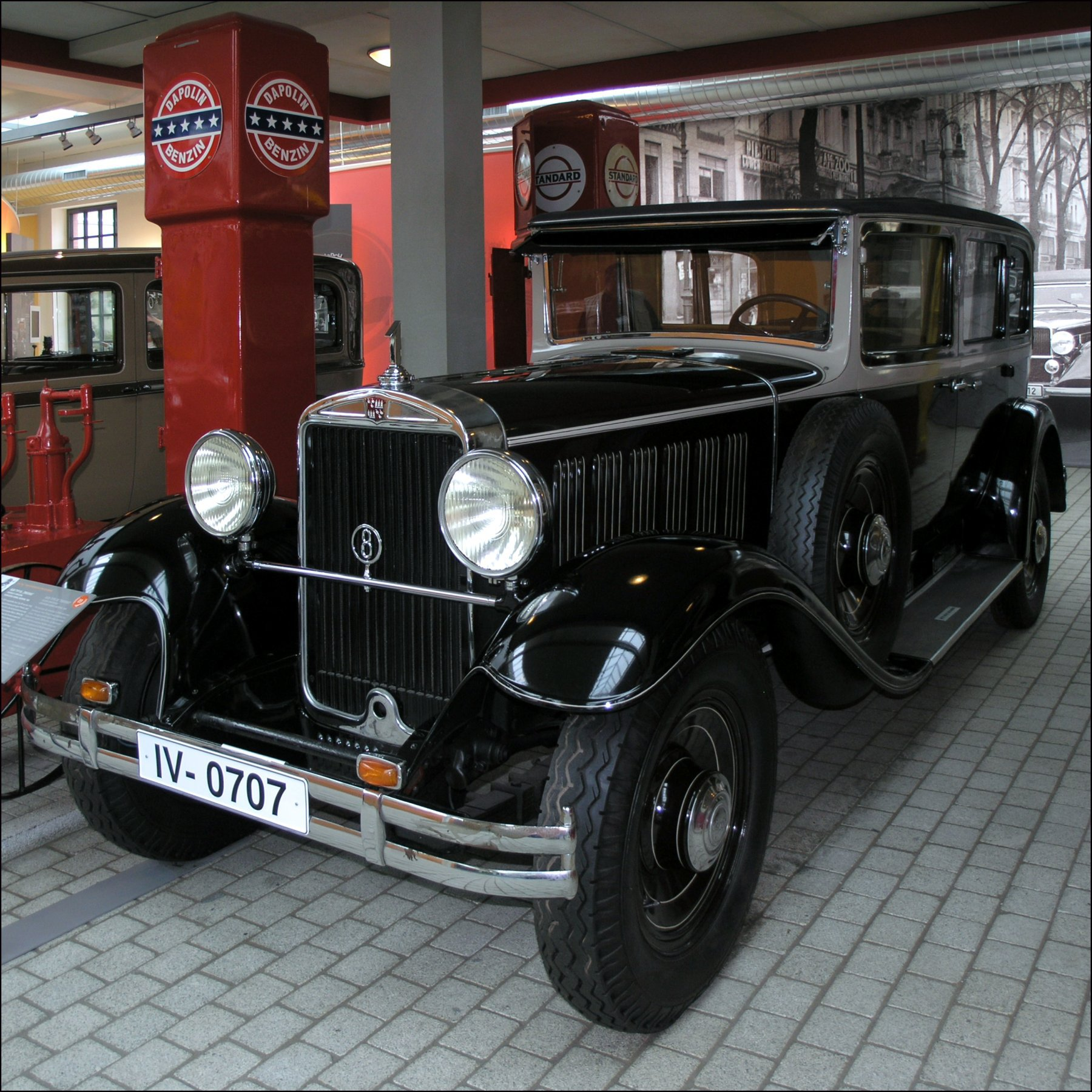 Audi typ SS „Zwickau“ (1930 / 1929-1932 475 vozů)